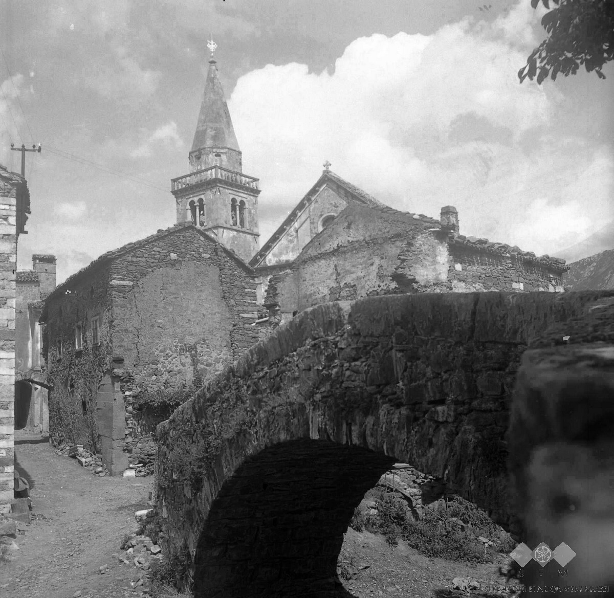 Šembid.